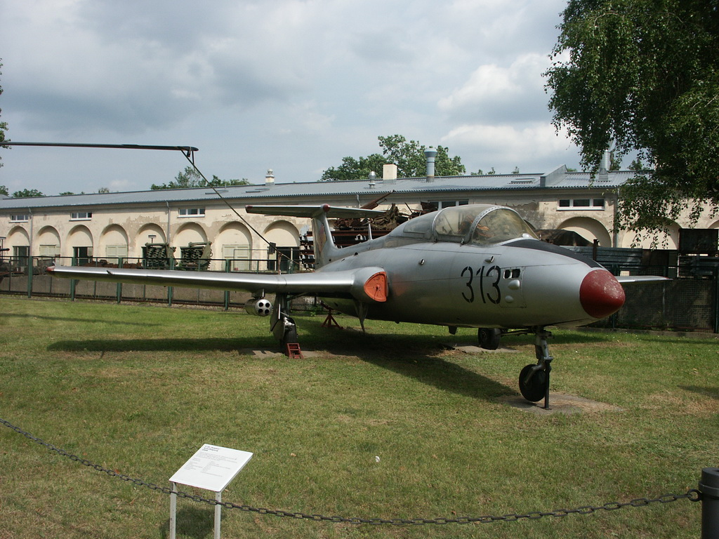 Bundeswehrmuseum Dresden mit Teilen von der NVA Remark: Aero L-29 Delphin jet trainer.